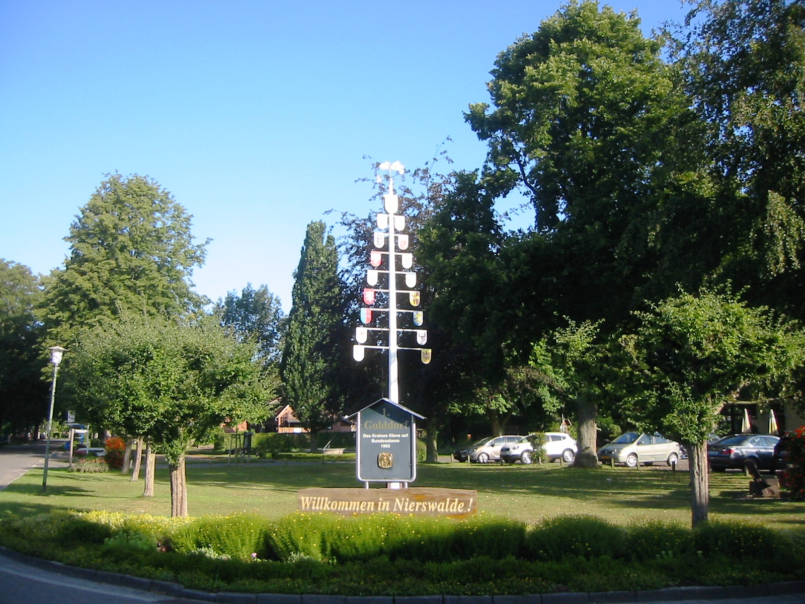 Dorfplatz in Goch-Nierswalde (Deutschland)